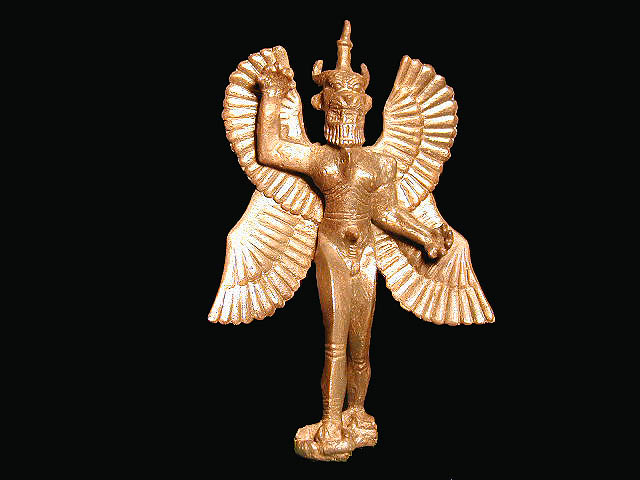 Pazuzu, mesopotamischer Dämon (1800-800 v. Chr.), Bronze, Altorientalische Sammlung der Universität Tübingen